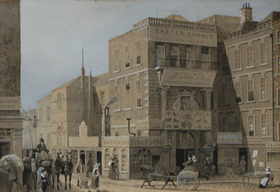 Exeter Change, Aquarell